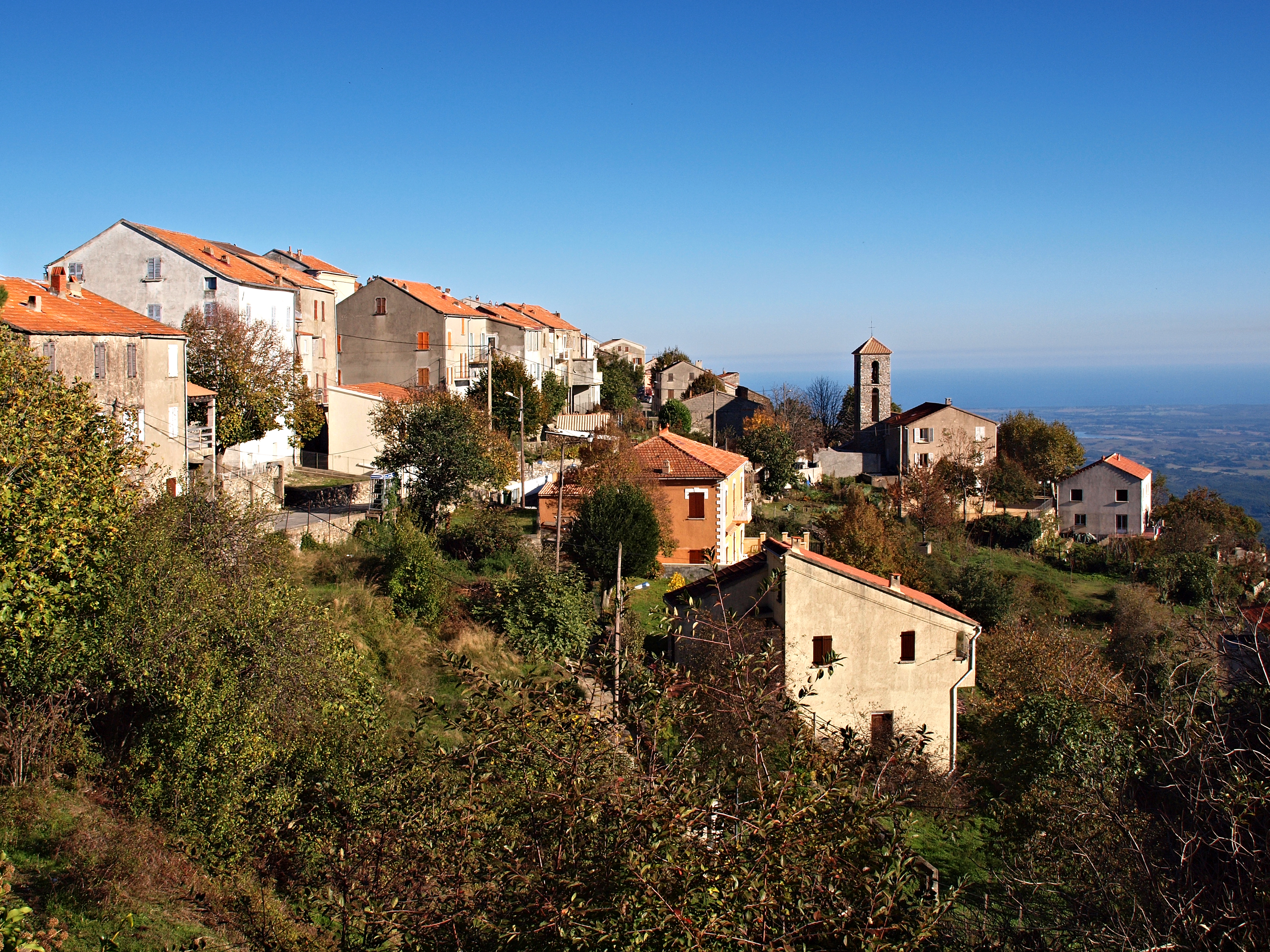 Antisanti (Corsica) - Vue du village